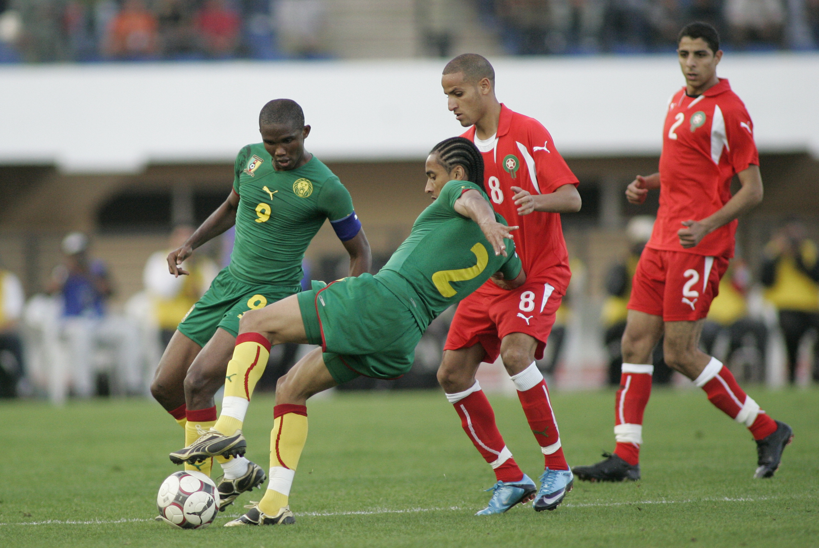 Match Maroc - Cameroun